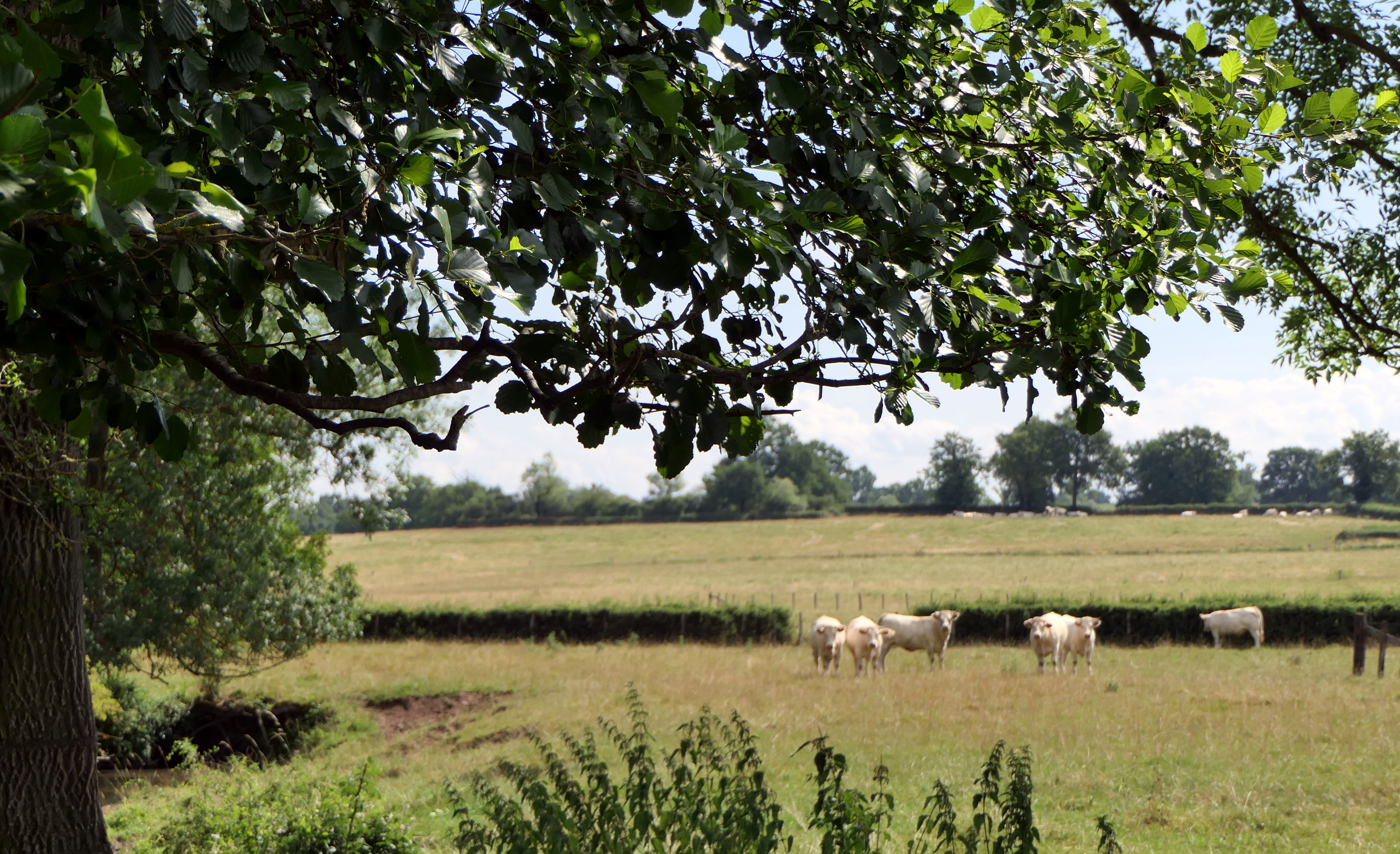 Saint-Forgeux Lespinasse élevage de bovins de race charolaise